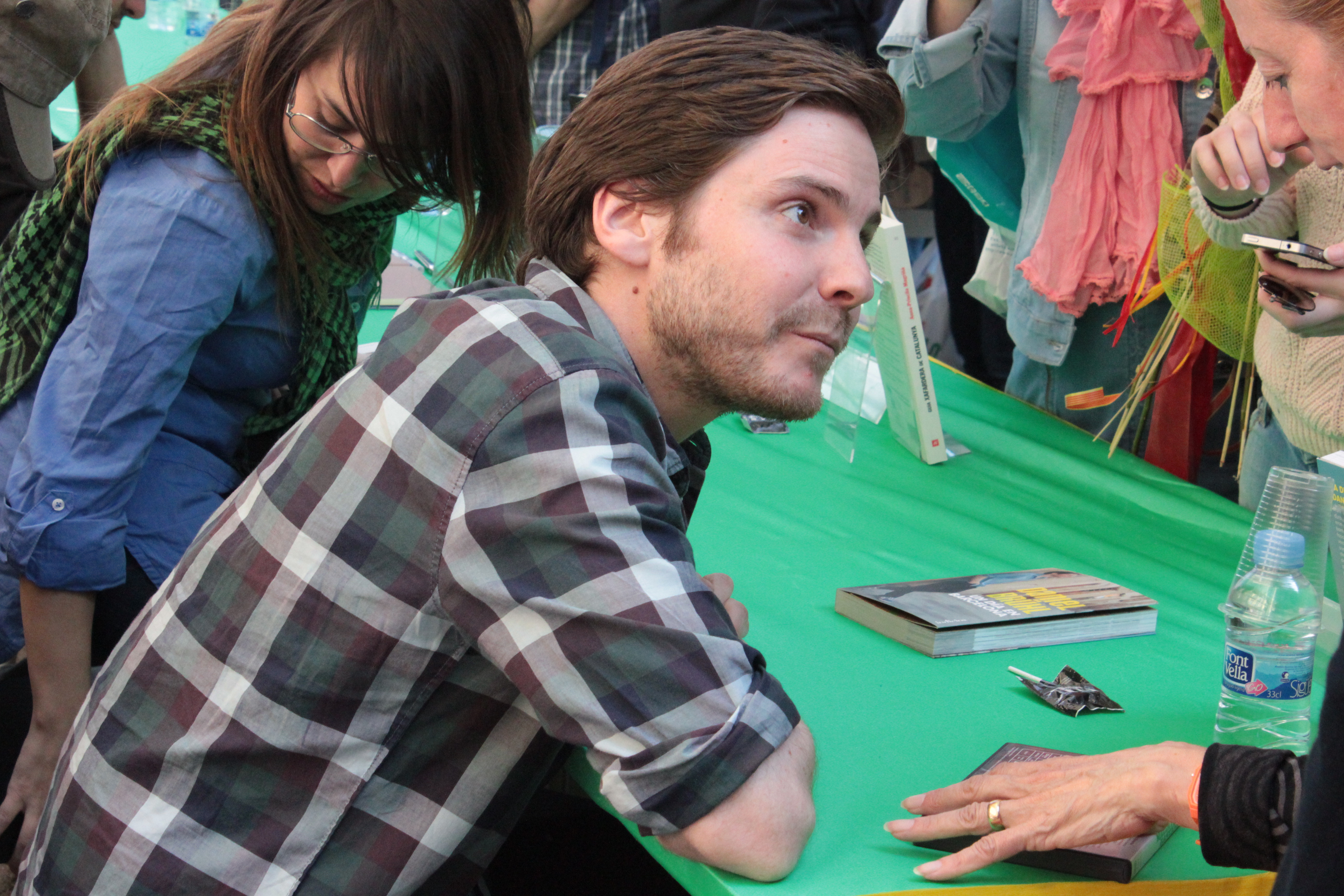 Daniel Brühl.